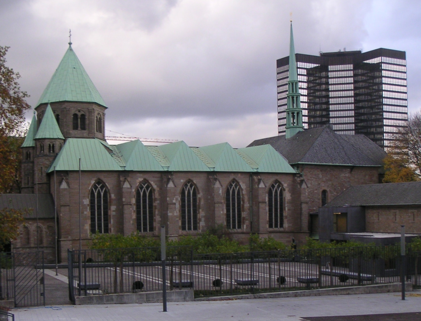 Essener Münster von Süden, 2010